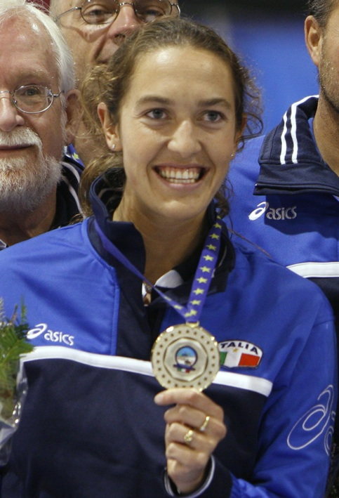 Chiara Olivieri